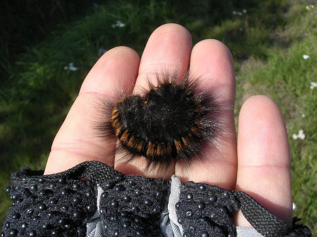 catepillar